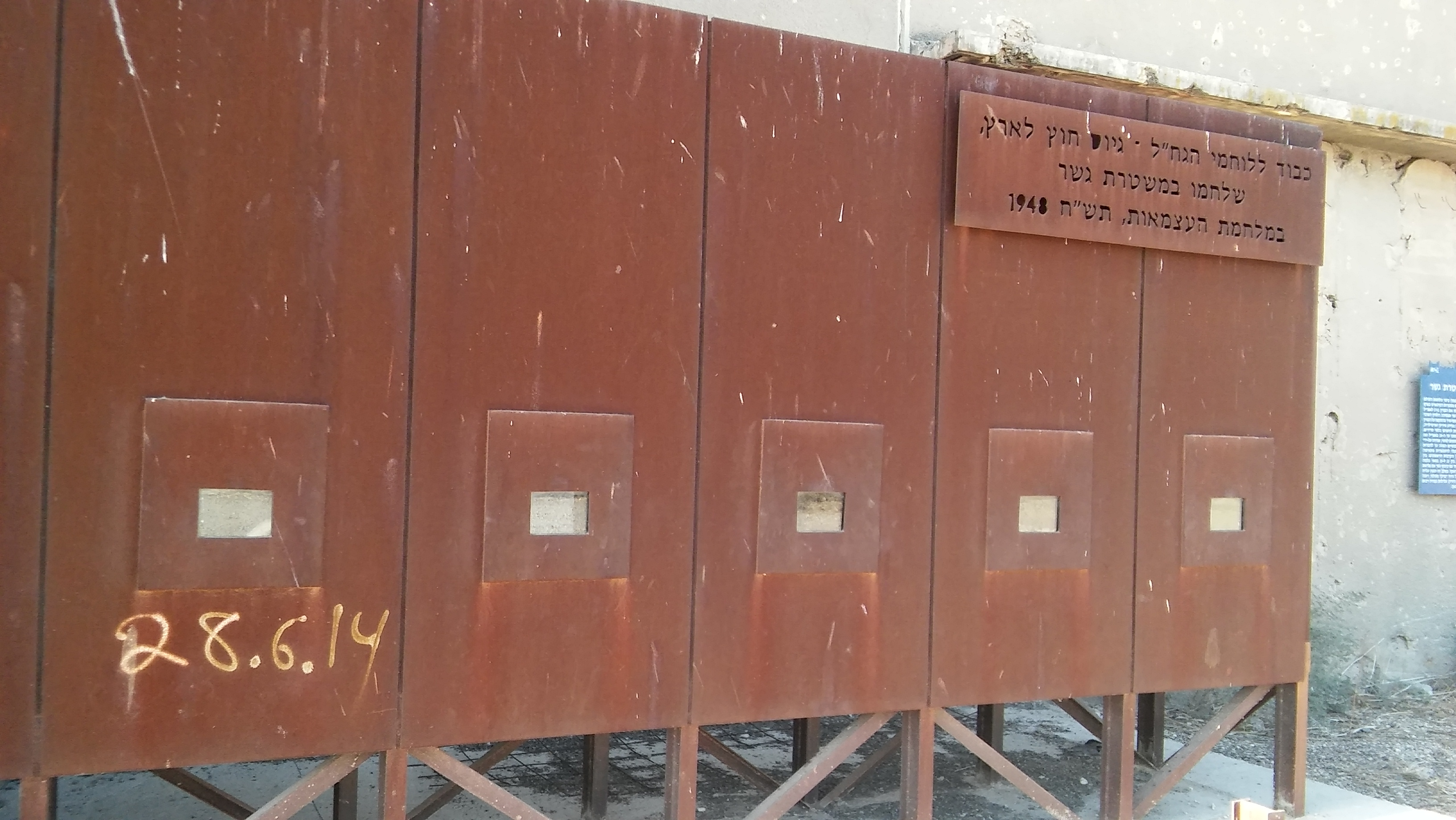 משטרת גשר